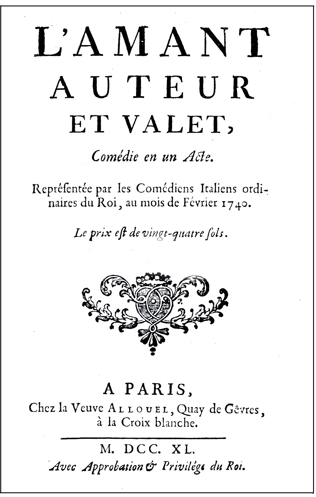 Frontispice de la 1e édition